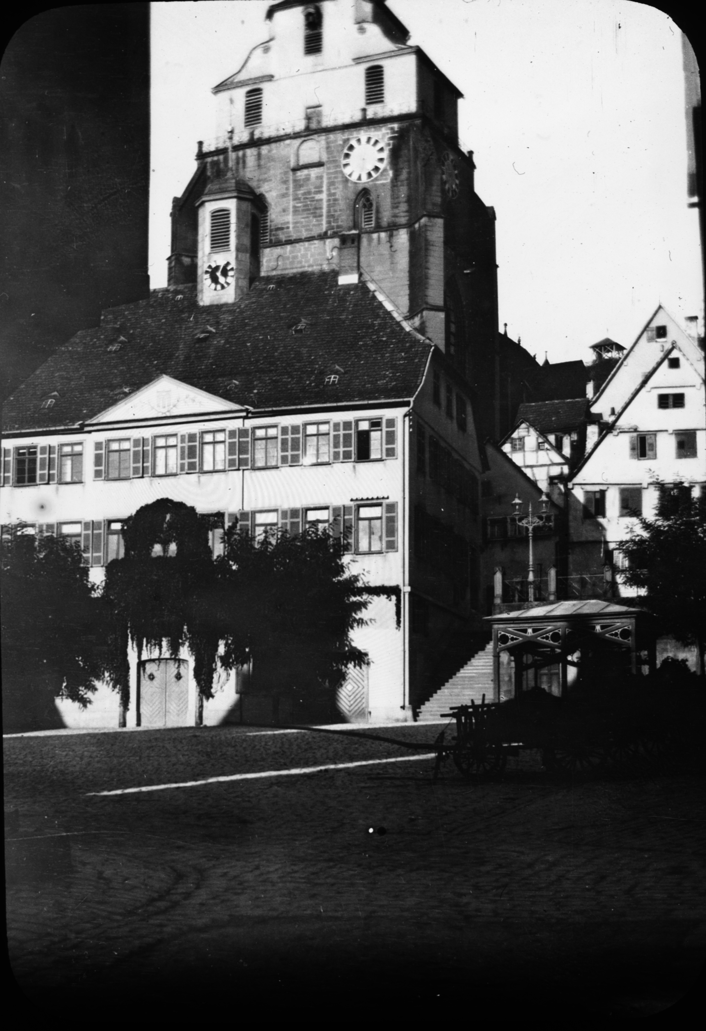 Glasnegativ, Marktplatz Herrenberg mit Kirche und Rathaus im Jahr 1908, Richtung Osten